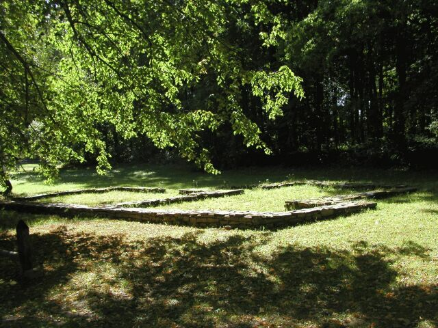 Základy Žižkova rodného trocnovského dvorce, objeveného roku 1956 archeologem dr. Antonínem Hejnou.